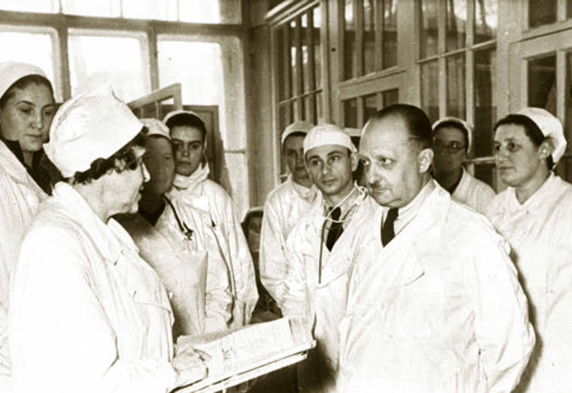 Профессорский обход в клинике госпитальной педиатрии ЛПМИ